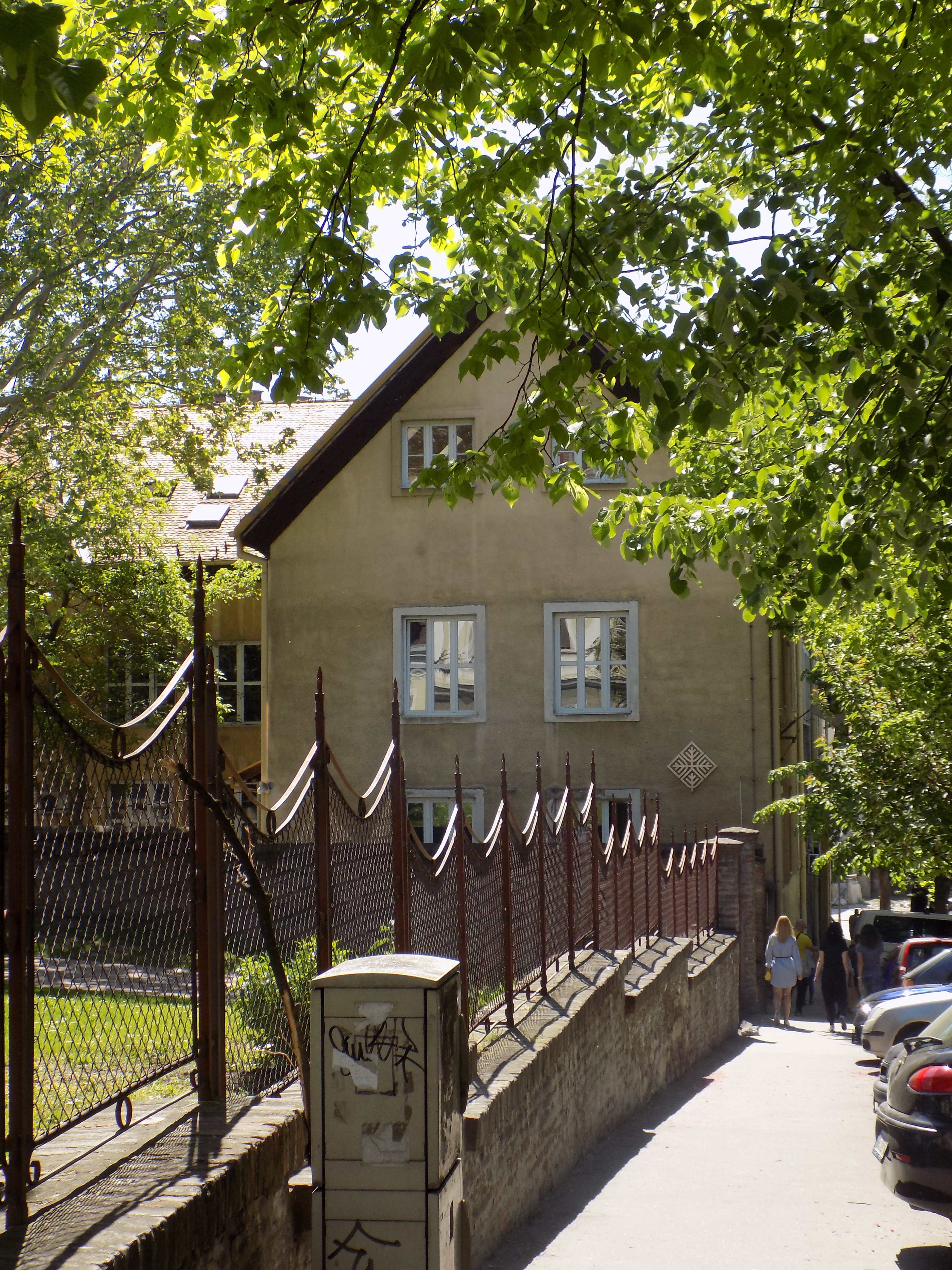 Zgrada umetničke skole u Beogradu u kojoj se danas nalazi Fakultet primenjenih umetnosti Univerziteta umetnosti u Beogradu